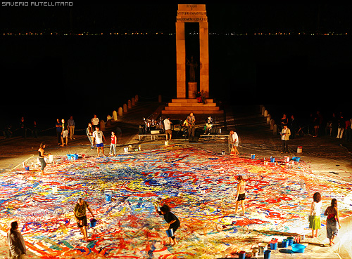 Reggio Calabria - Arena dello Stretto - Performance di action painting e free jazz eseguita dall'Accademia di Belle Arti di Reggio Calabria e dal Conservatorio Francesco Cilea di Reggio Calabria durante la festa del solstizio d'estate 2005. Foto concessa dall'Autore - Saverio Autellitano, - purché se ne citi e se ne riconosca la paternità anche su opere derivate.